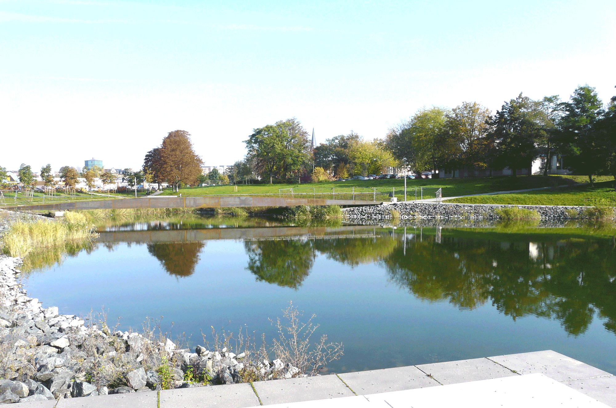 Inmitten des Stadtgebiets von Staßfurt, in der Mitte des Senkungstrichters über den Grubenbauen der ersten Kalischächte der Welt, liegt heute der sogenannte "Staßfurt-See" (im Vordergrund eine diesen See überspannende Fußgängerbrücke; im Bildhintergrund liegen die beiden abgedeckelten und verfüllten Alt-Kalischächte "v.d. Heydt" und "v. Manteuffel") .